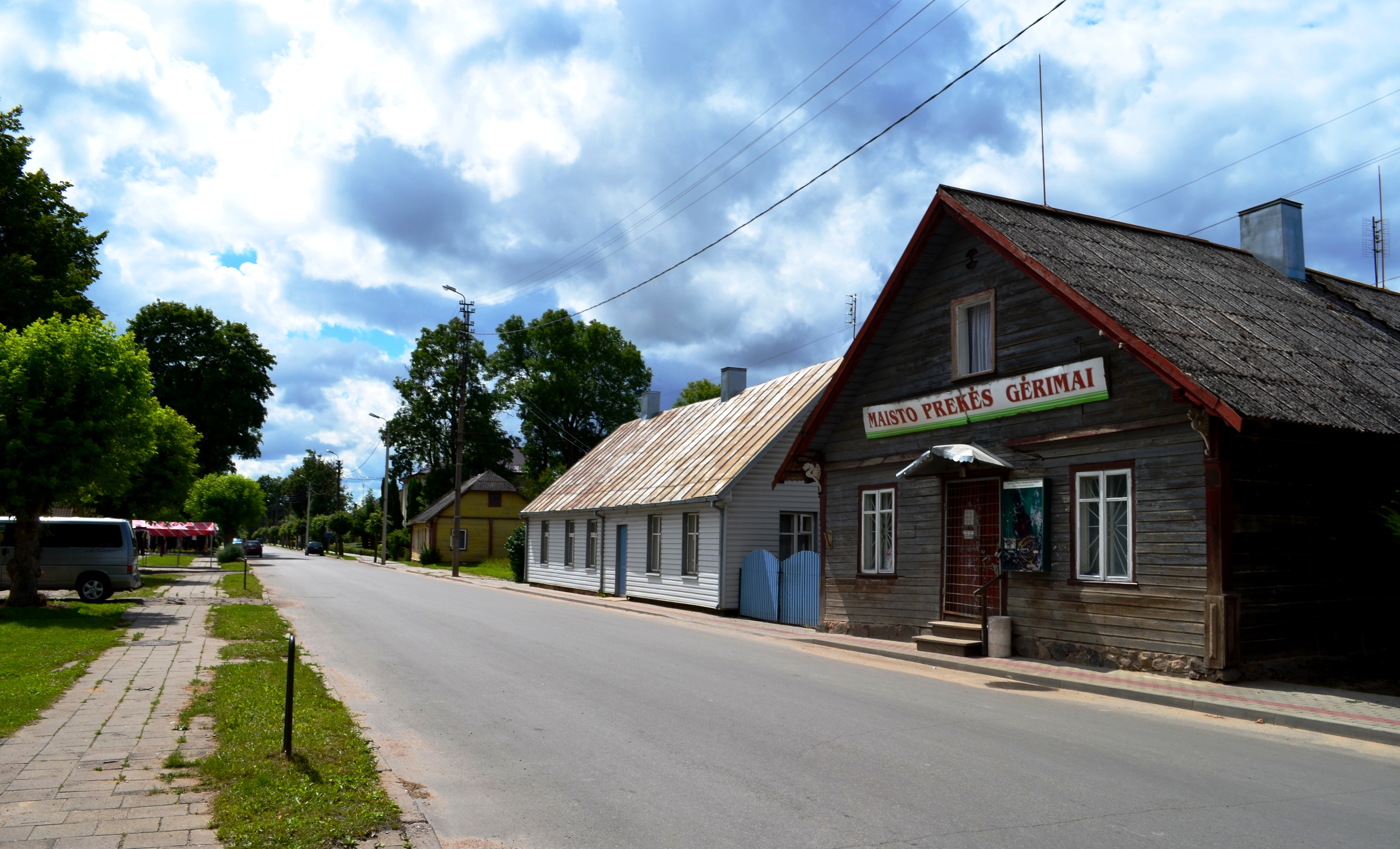 Naujamiestis, Panevėžio raj.